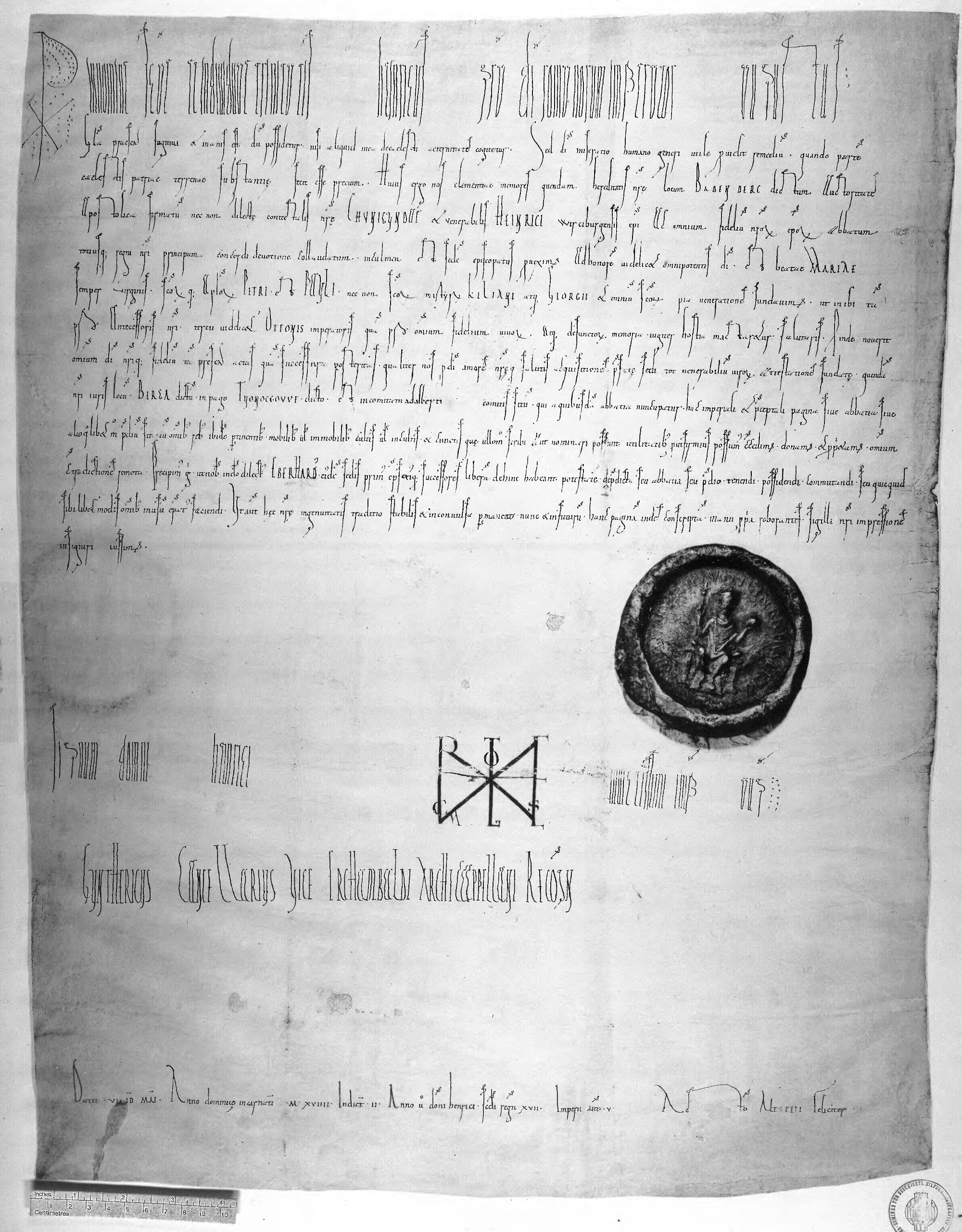 Urkunde Heinrichs II. (römisch-deutscher Kaiser) über die Schenkung des Ortes Berga (Bogenberg im Donaugau) an das Bistum Bamberg vom 10. Mai 1019.